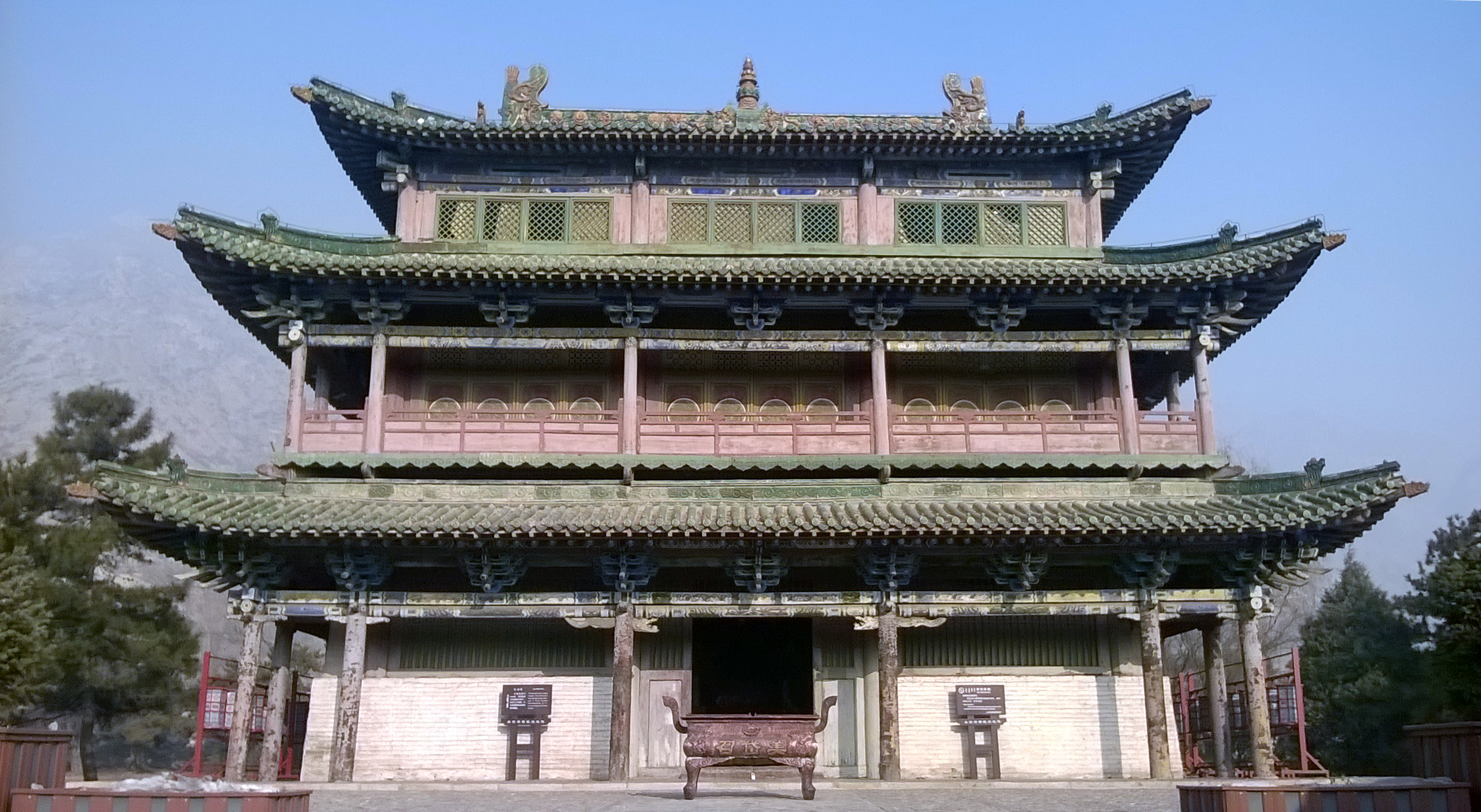 美岱召琉璃殿。